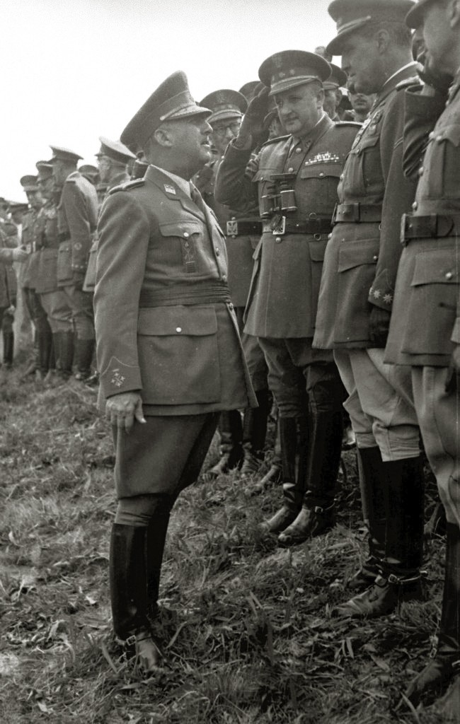 Título original: Francisco Franco junto a autoridades militares en unas maniobras (10/19) Localización: Guipúzcoa